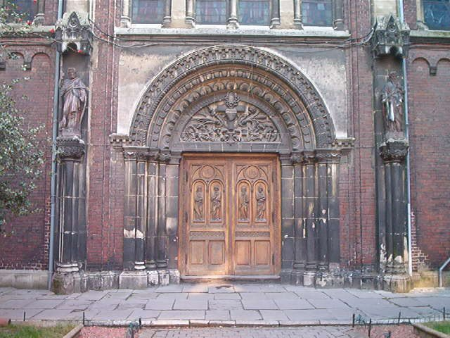 Grande Chapelle de l'Institution Libre du Sacré-Coeur, à Tourcoing (1860).